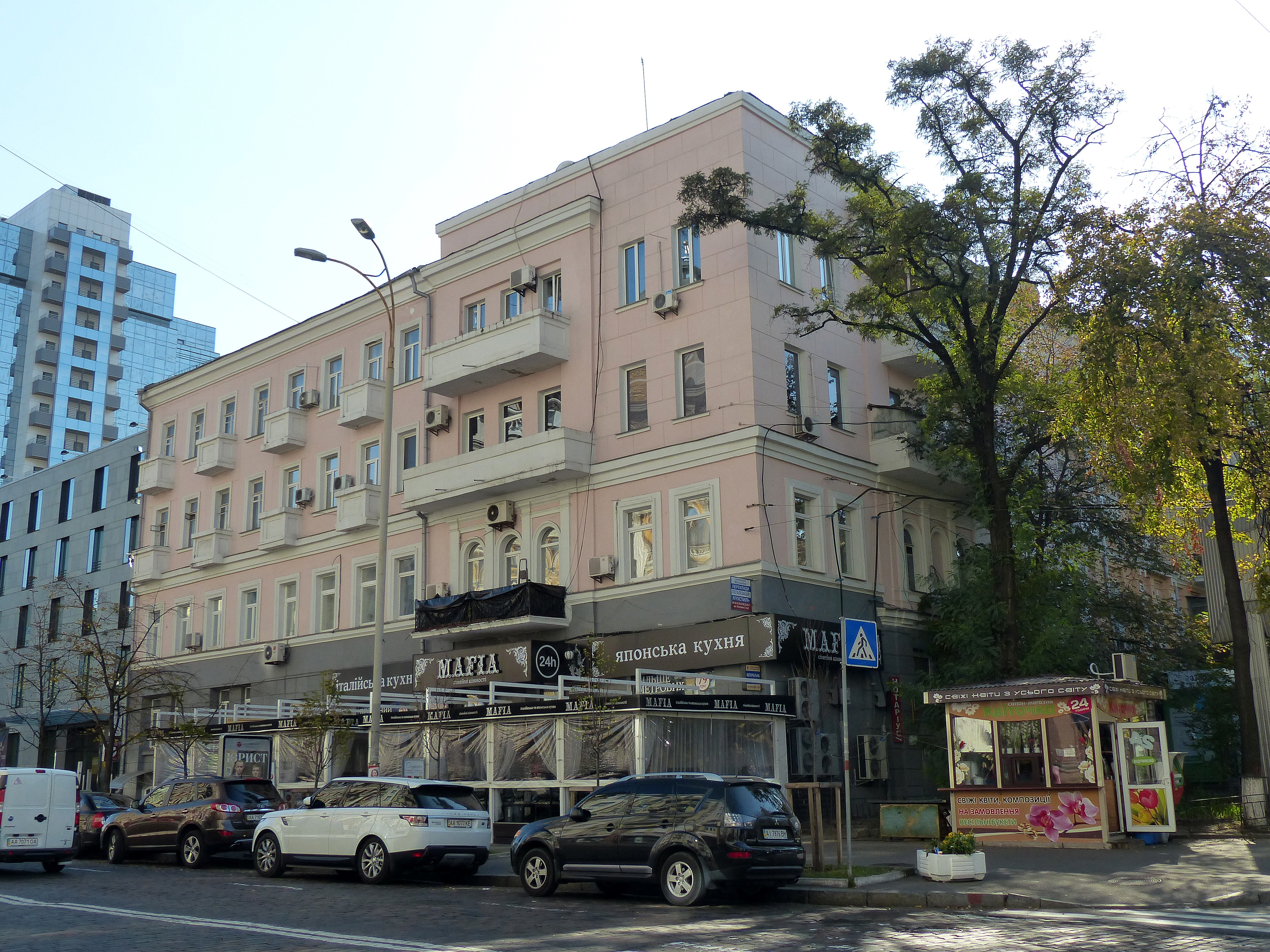 Будинок, в якому у 1905–1920 рр. жила Екстер О. О., у 1918–1919 рр. розміщувалась її майстерня живопису, де працювали художники: Меллер В., Петрицький А., Тишлер О., Козинцеви Л.та Г., Юткевич С.; бували письменники Еренбург І., Ліфшиць В., Мандельштам О., Шкловський В., Київ, Хмельницького Богдана вул., 27/1